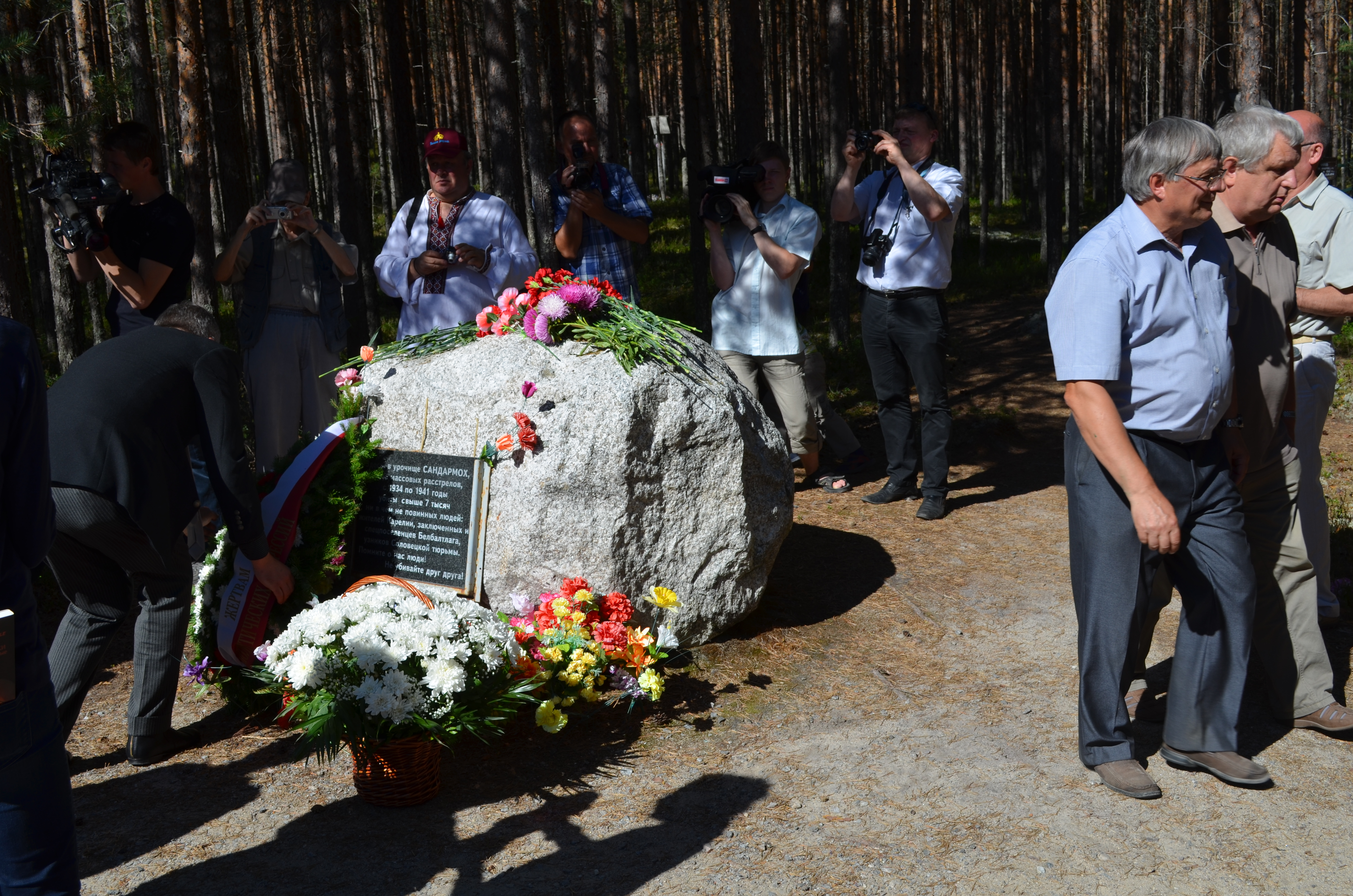 Урочище Сандармох. Дні пам’яті. Покладання квітів до Соловецького каменя